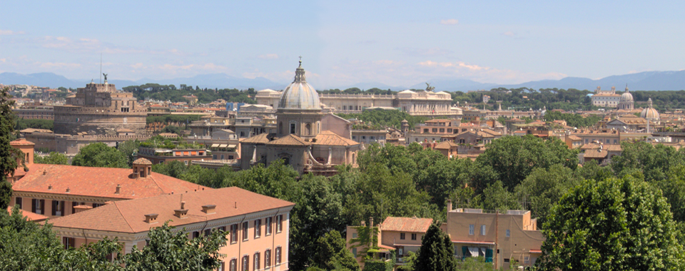 Montaggio di foto di ROma vista dal Gianicolo.